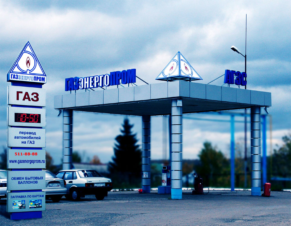 АГЗС ГК Газэнергопром в Казани